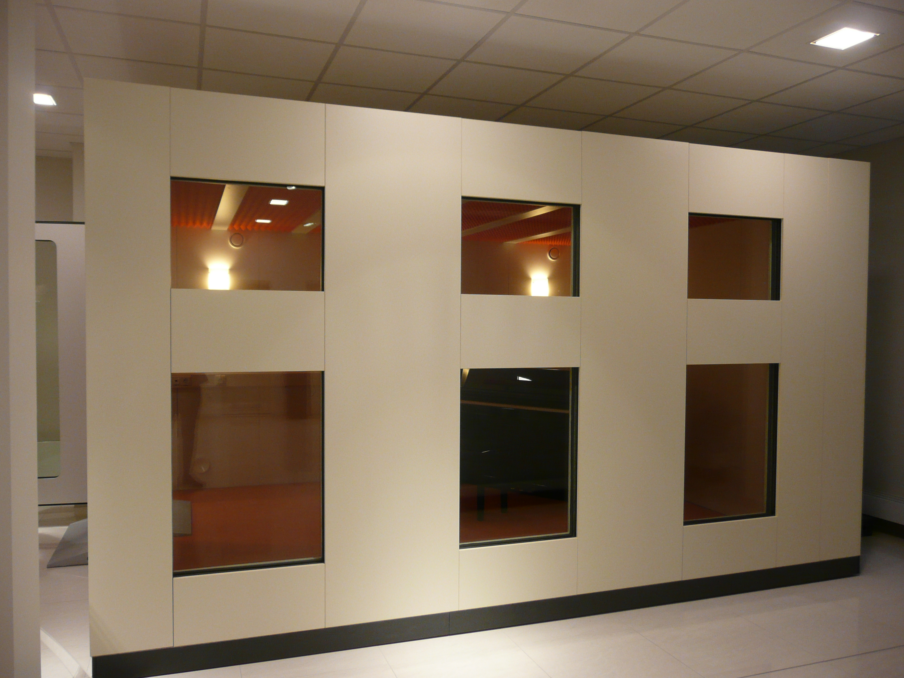 Schallschutzkabine von SoundSTOPcube großen Fensterflächen und modernen Design.